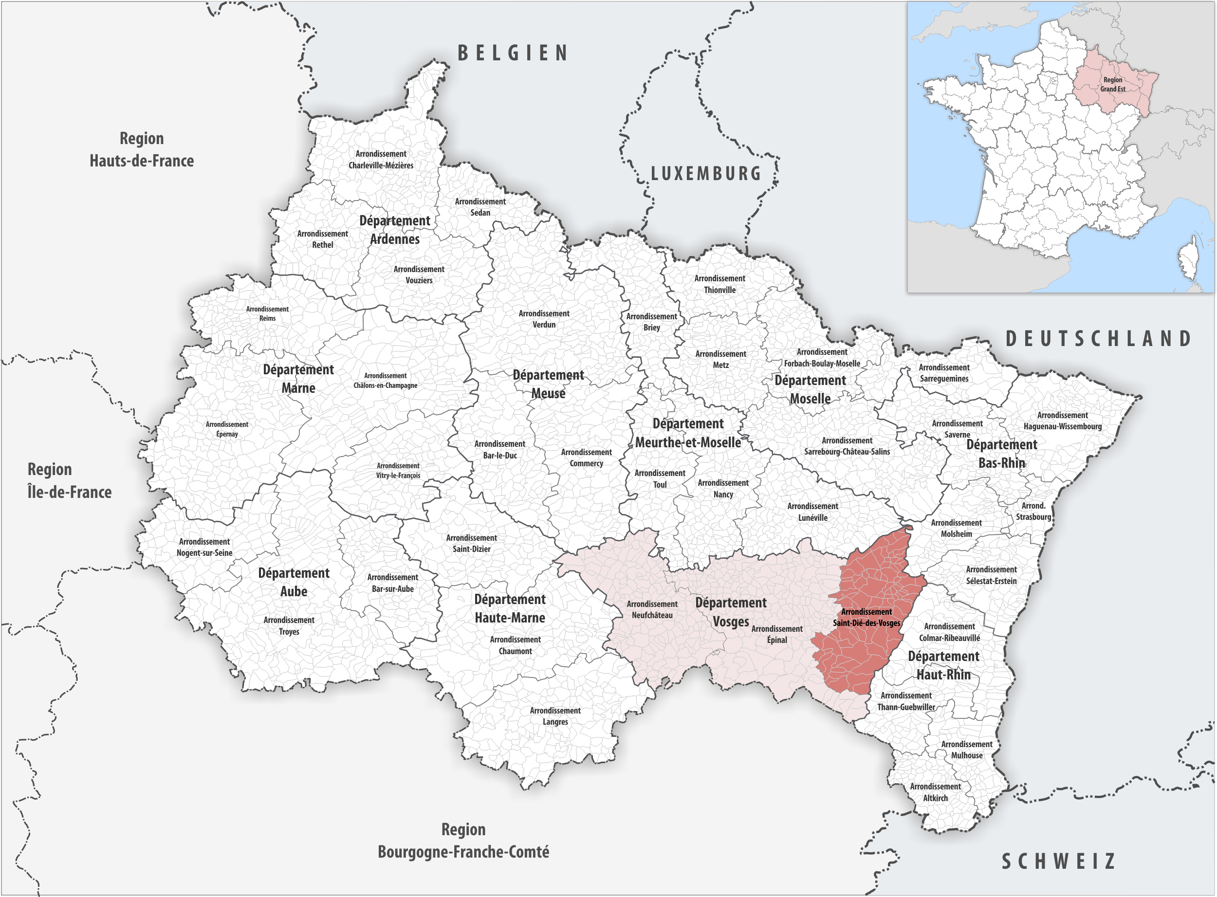 Lage des Arrondissements Saint-Dié-des-Vosges